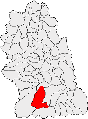 Categorie:Hărţi ale judeţului Hunedoara